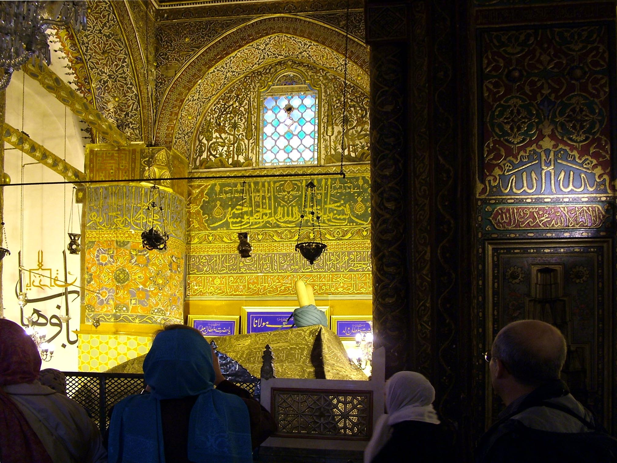 Mevlana Mauzóleum (Konya, Törökország)